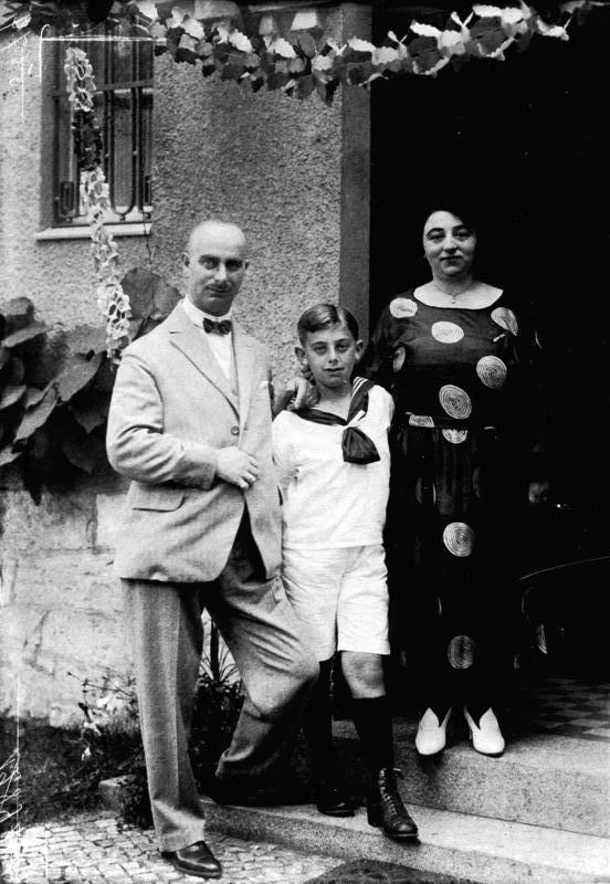 Die Urteilsverkündung im Barmatprozess im großen Schwurgerichtssaal in Moabit. Der Prozeß dauerte 14 Monate und kostete ca. 400.000,-. Julius Barmat (X) , welcher wegen aktiver Bestechung in 2 Fällen zu einer Gesamtstrafe von 11 Monaten Gefängnis verurteilt wurde, mit seiner Gattin und seinem Sohne.